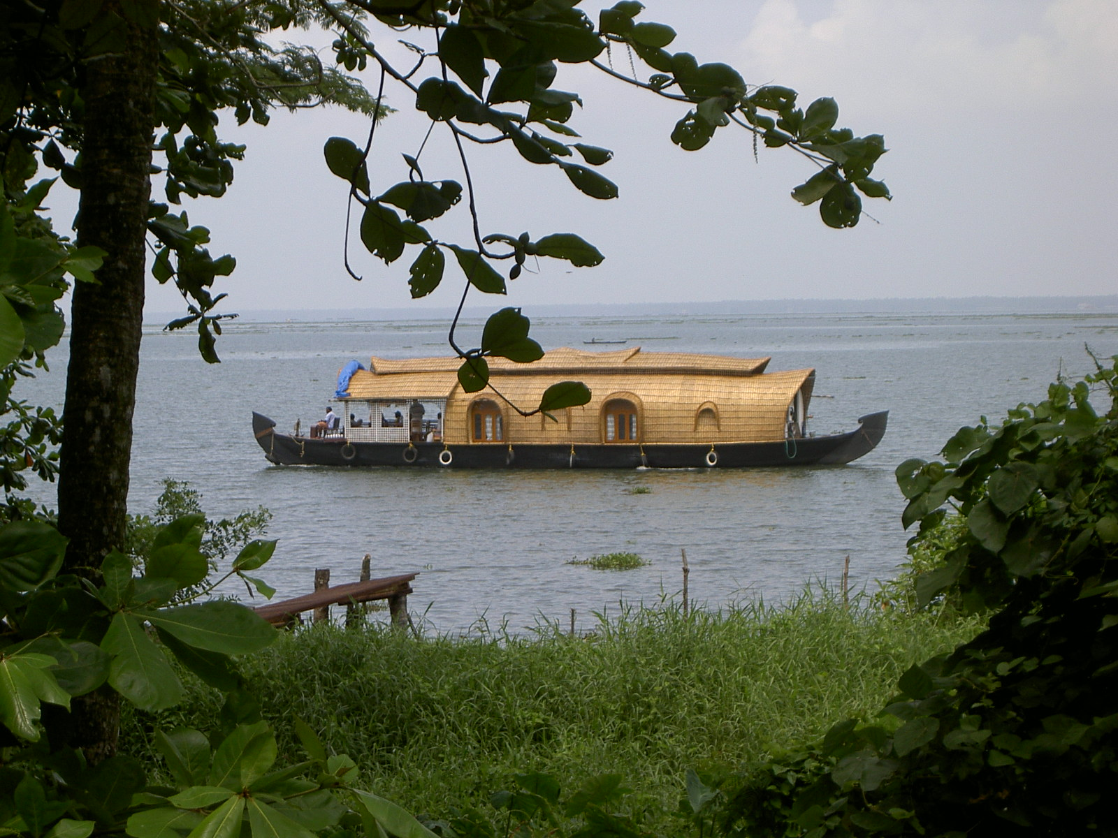 A Kerala House boat shot in Kumarakom,Kerala,India